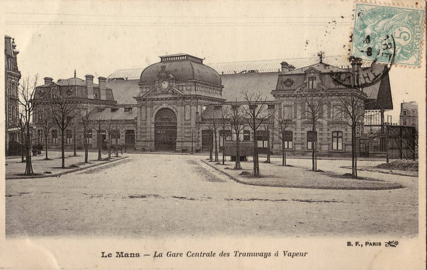 Carte postale ancienne éditée par BF à Paris : LE MANS - La Gare centrale des Tramways à Vapeur (Gare du Mans-les-Halles des Tramways de la Sarthe).